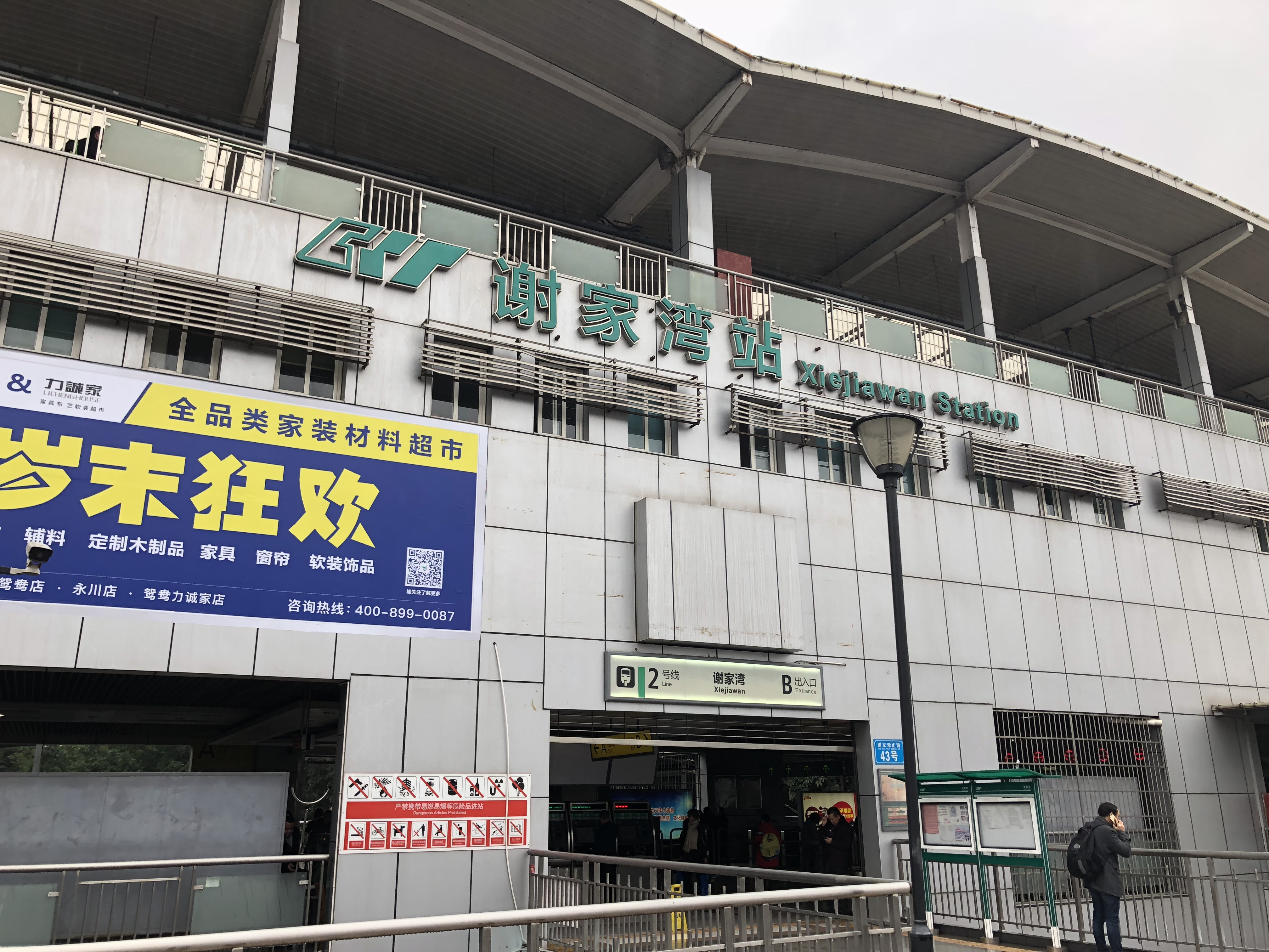 2 号线谢家湾站 B 出口